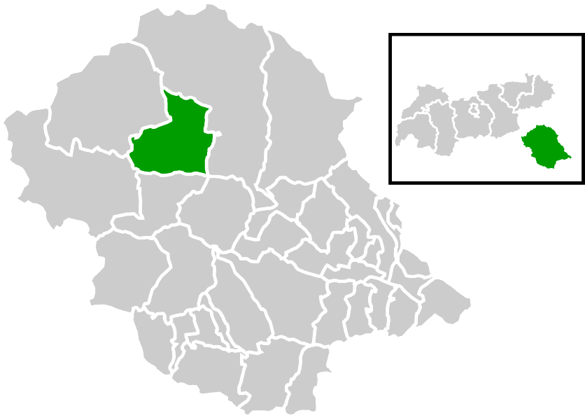 Lage der Gemeinde innerhalb des Bezirks Lienz